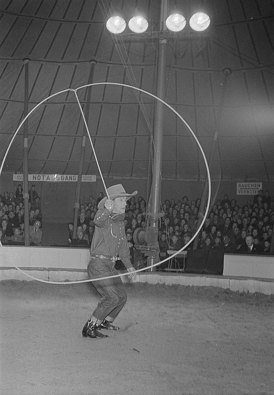 Original image description from the Deutsche Fotothek Zirkusdarbietung von Lassokünstlern